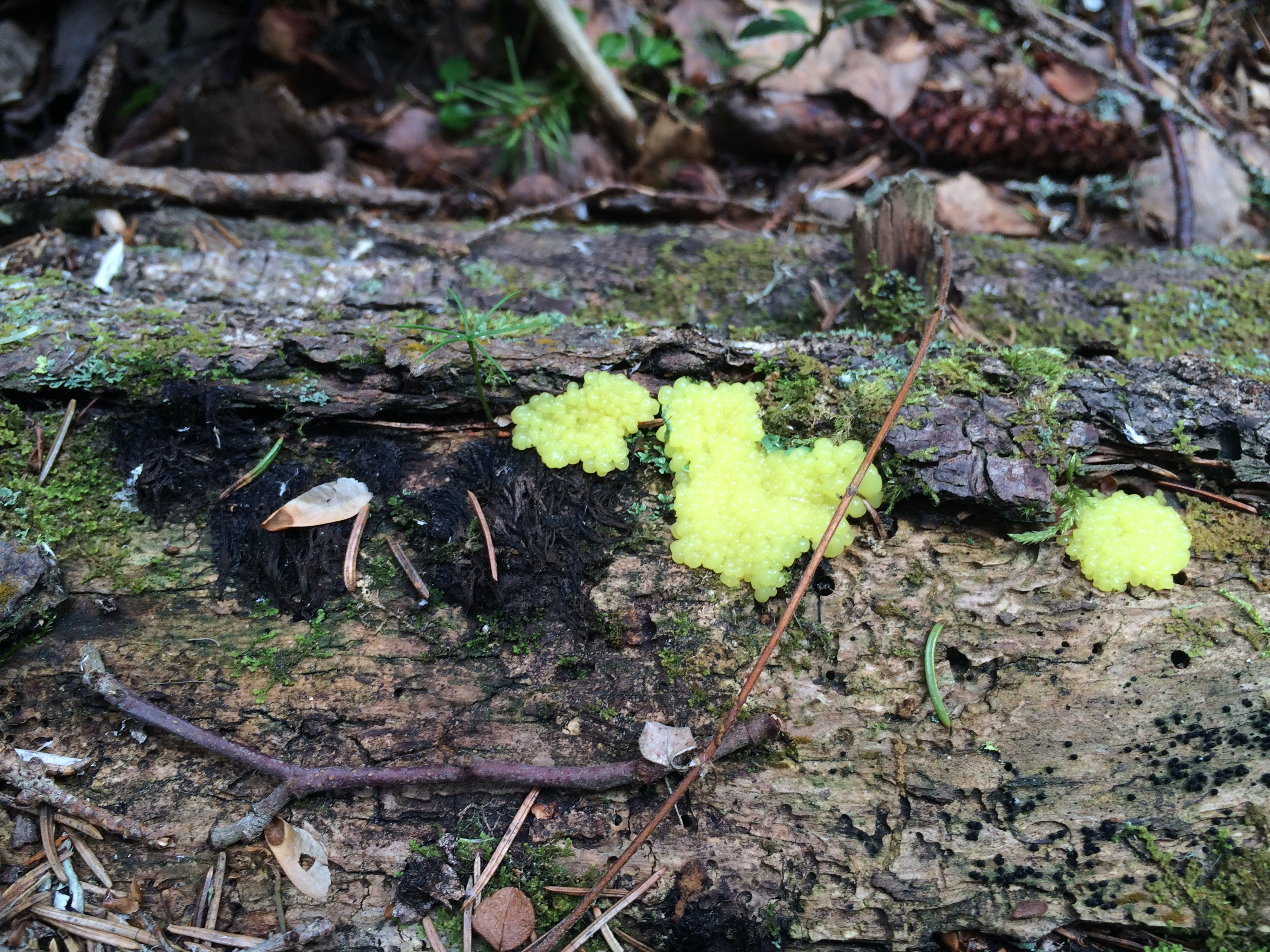 Exemplar av S. fusca i sin gulvita fas, fotograferad i Fillingen, Nordmaling den 14 juli 2016.